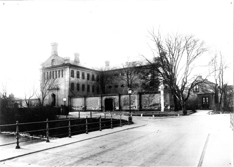 Malmöhus county prison, in use 1855-1921. Länscellfängelset i Malmö, i bruk 1855-1921.